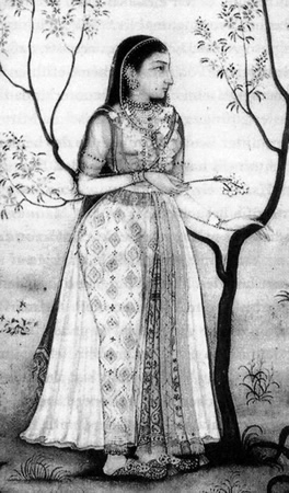 Mogulprinzessin Jahanara (*1614/ † 1682), Darstellung von ca. 1635.